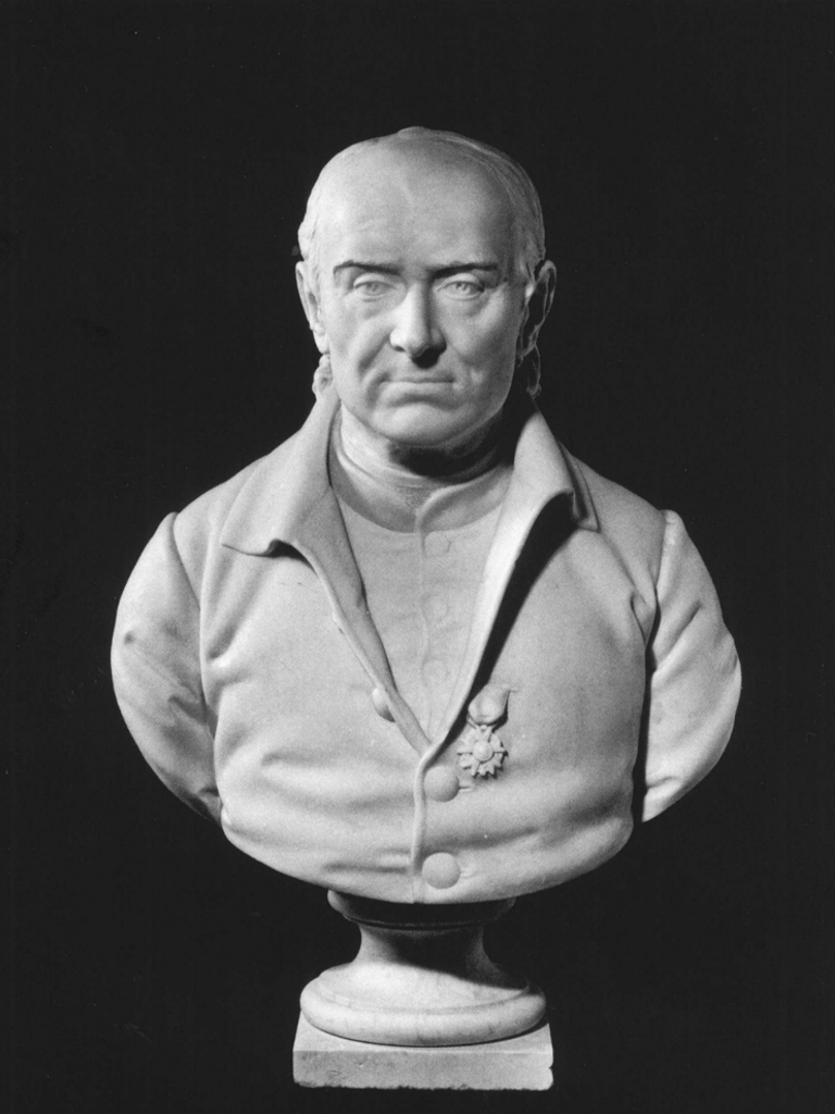 Busto di Jacopo Morelli, opera di Giuseppe Soranzo (1891-1892). Il busto fa parte del Panteon Veneto, conservato presso Palazzo Loredan di Campo Santo Stefano a Venezia.